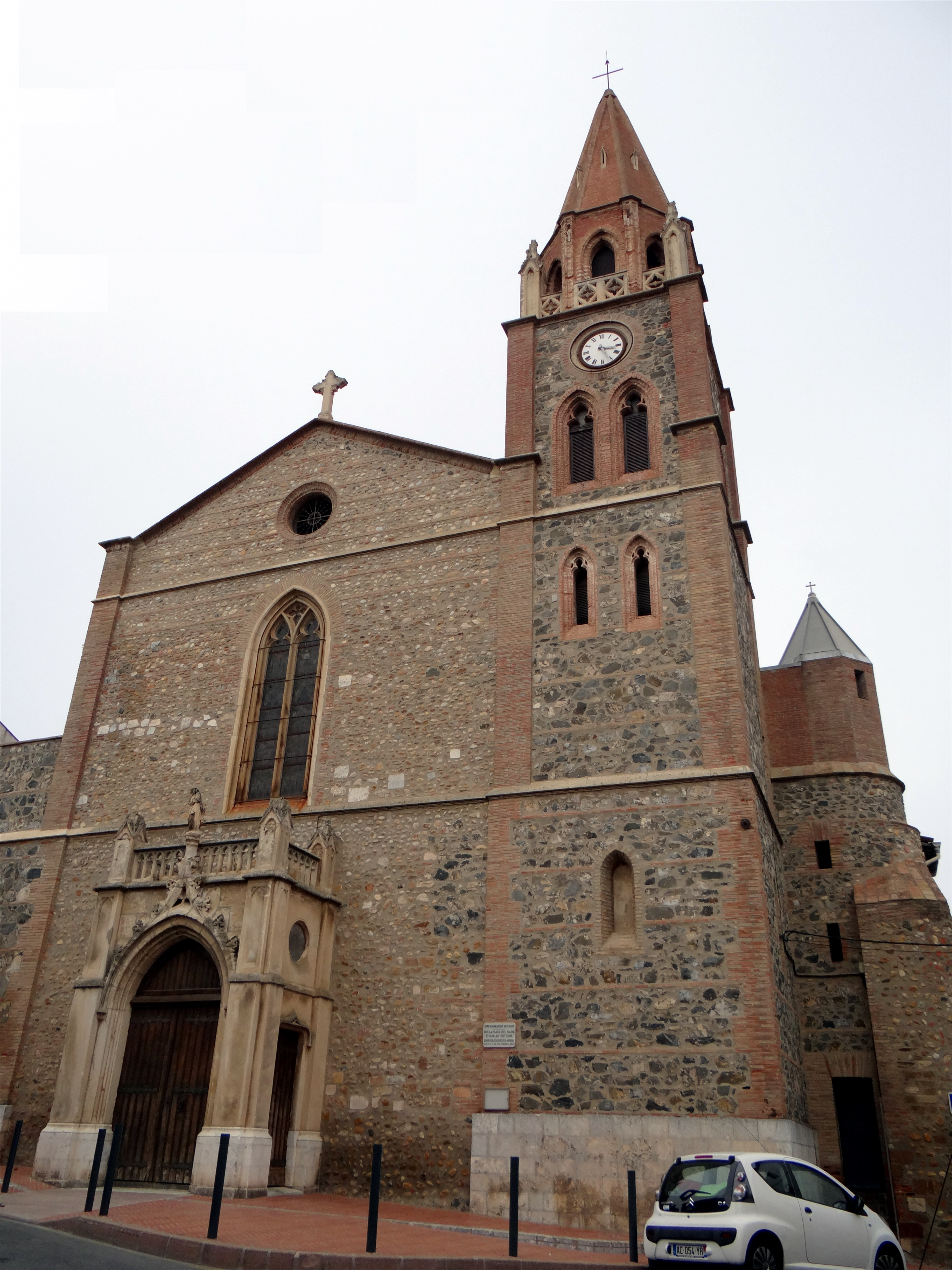 Église Saint-Cirq et Sainte-Julitte, Pia, Pyrénées-Orientales, France.